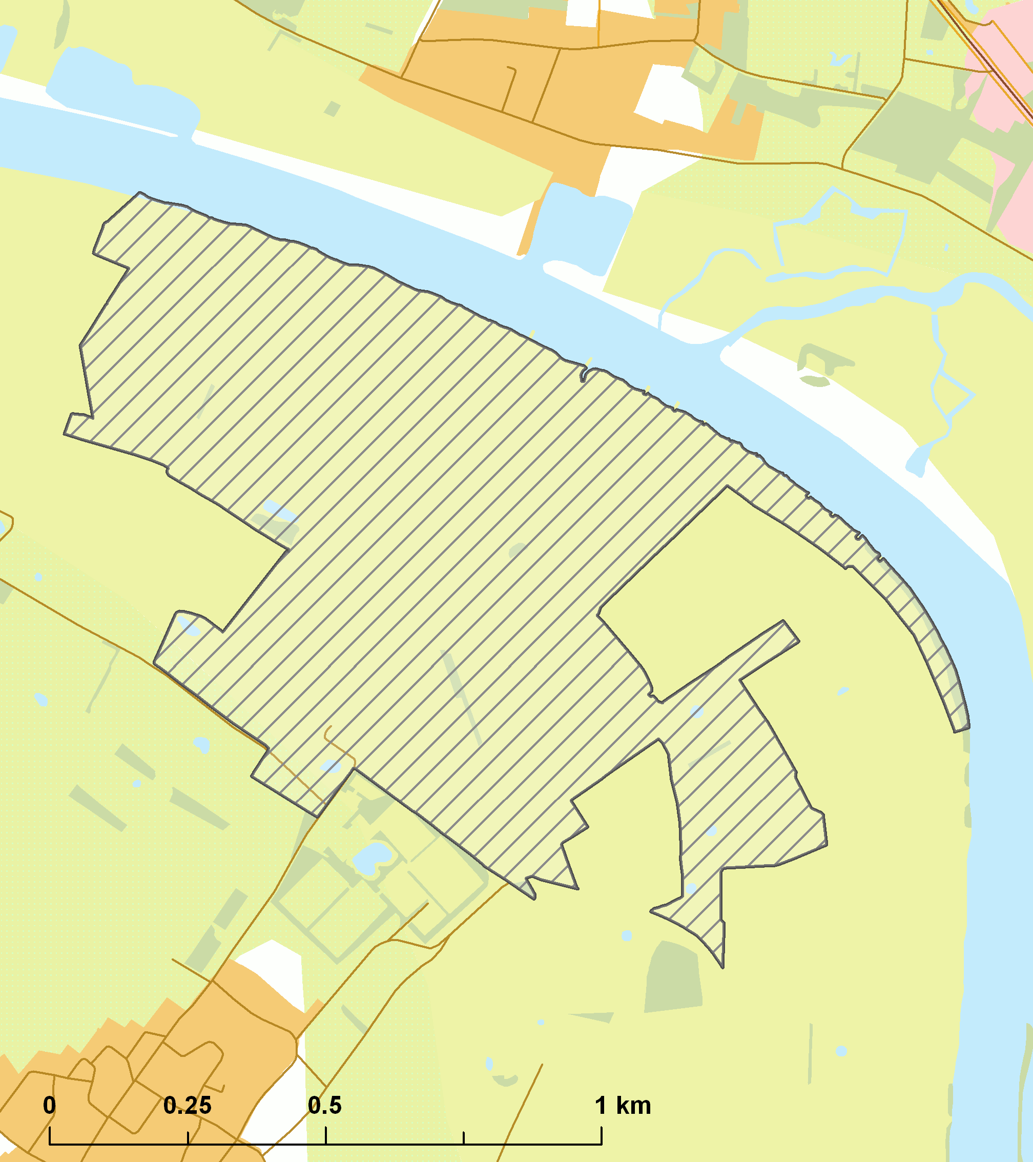 Natura2000 - Oeffelter Meent.png